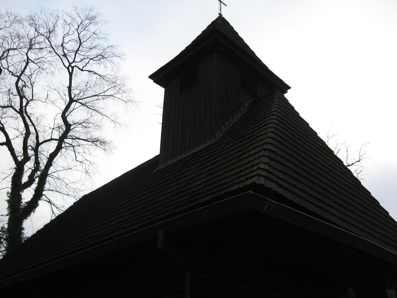 Kościół Podwyższenia Krzyża Świętego w Ligocie Górnej